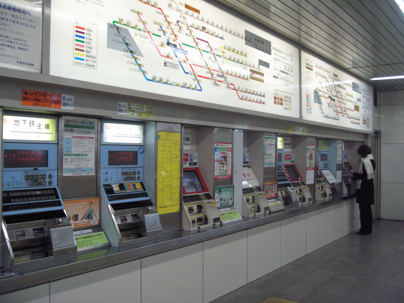 Shinsaibashi Station, Osaka, Kansai Region.